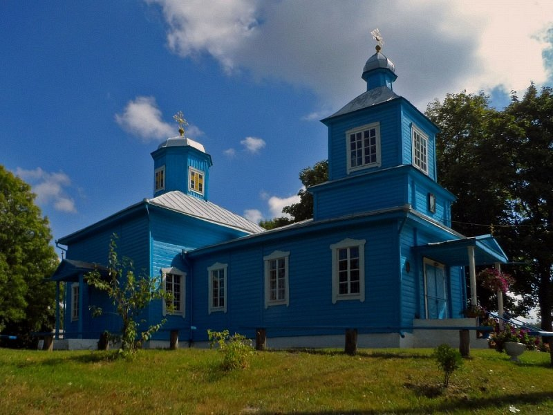 Ставок. Увазнясенская царква